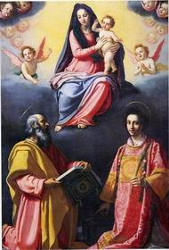 Chiesa di San Lorenzo a Usella, madonna dell'empoli